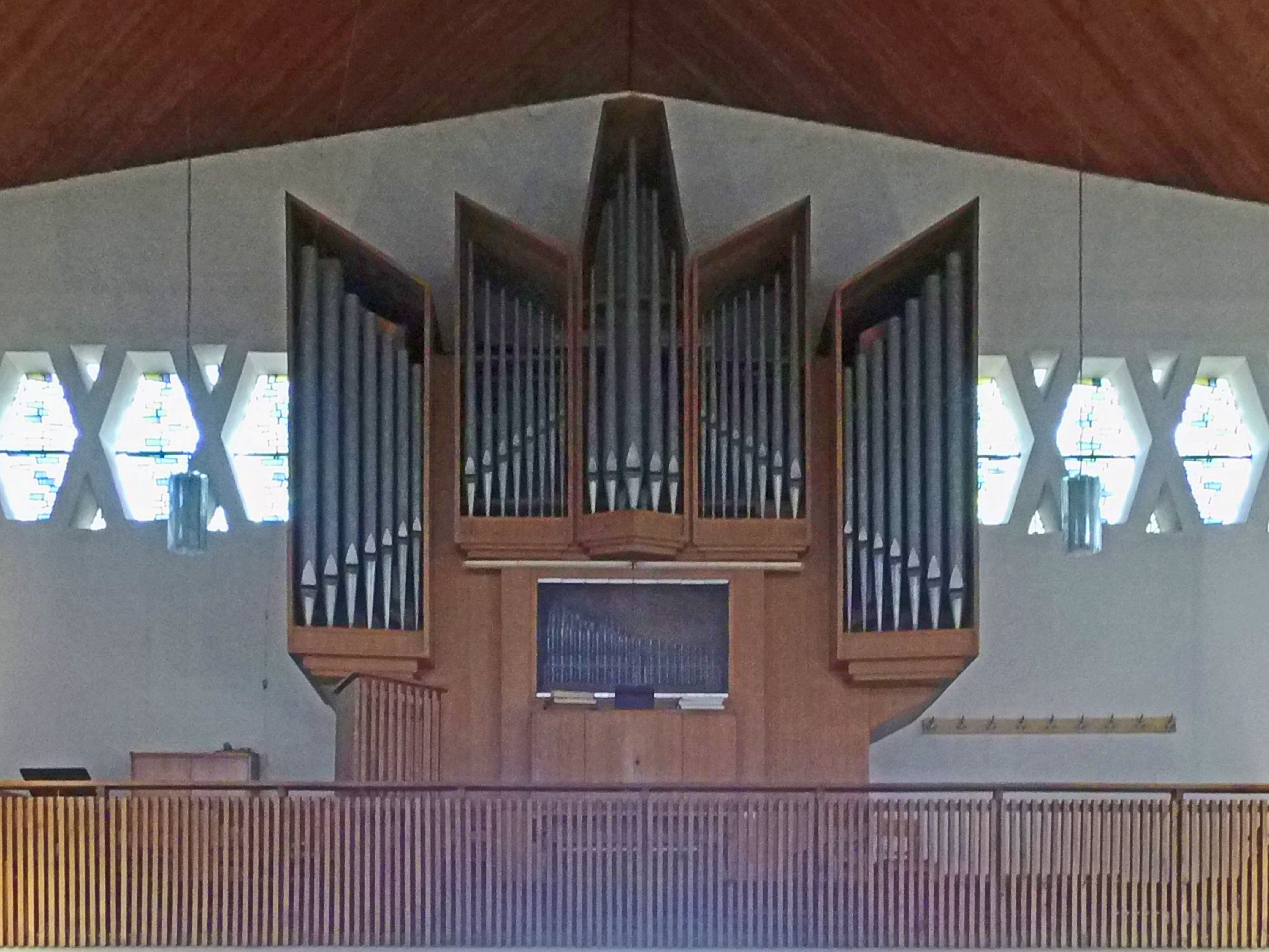 Orgel in der katholischen St-Marien-Kirche in Lengede.